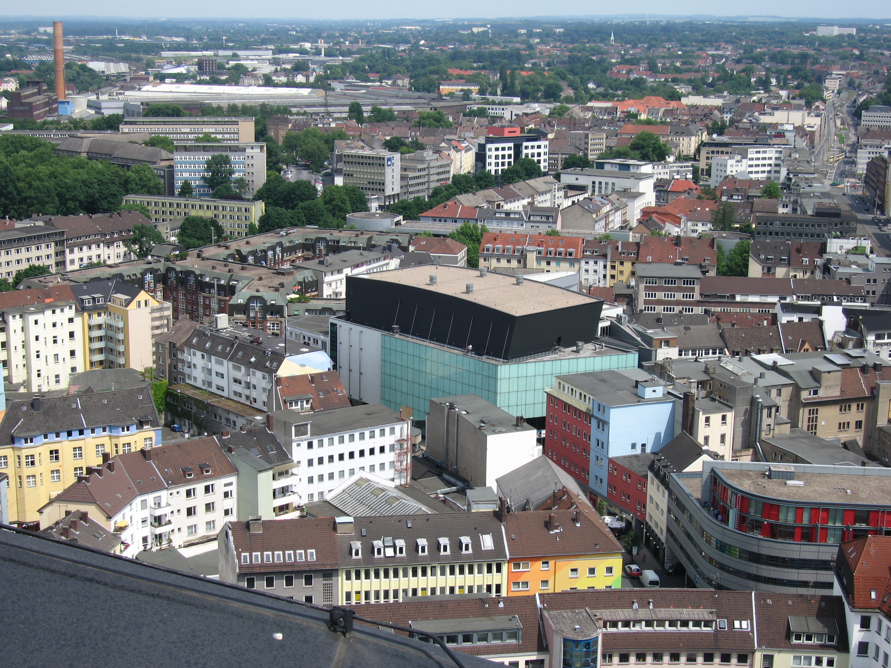 Konzerthaus Dortmund vom RWE Tower aus